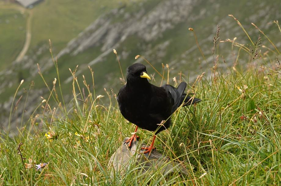 Kavče žlutozubé